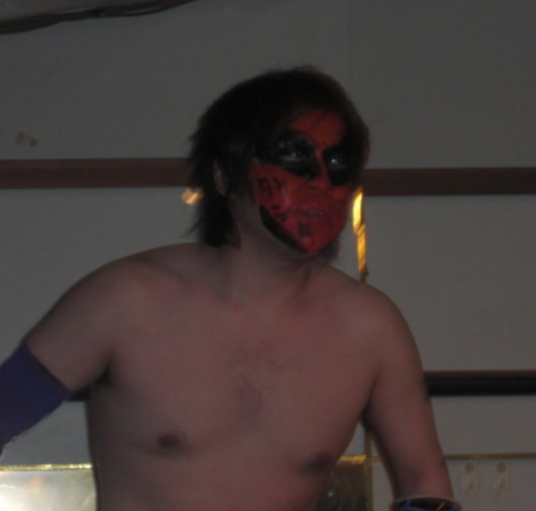 グレートミタの代役